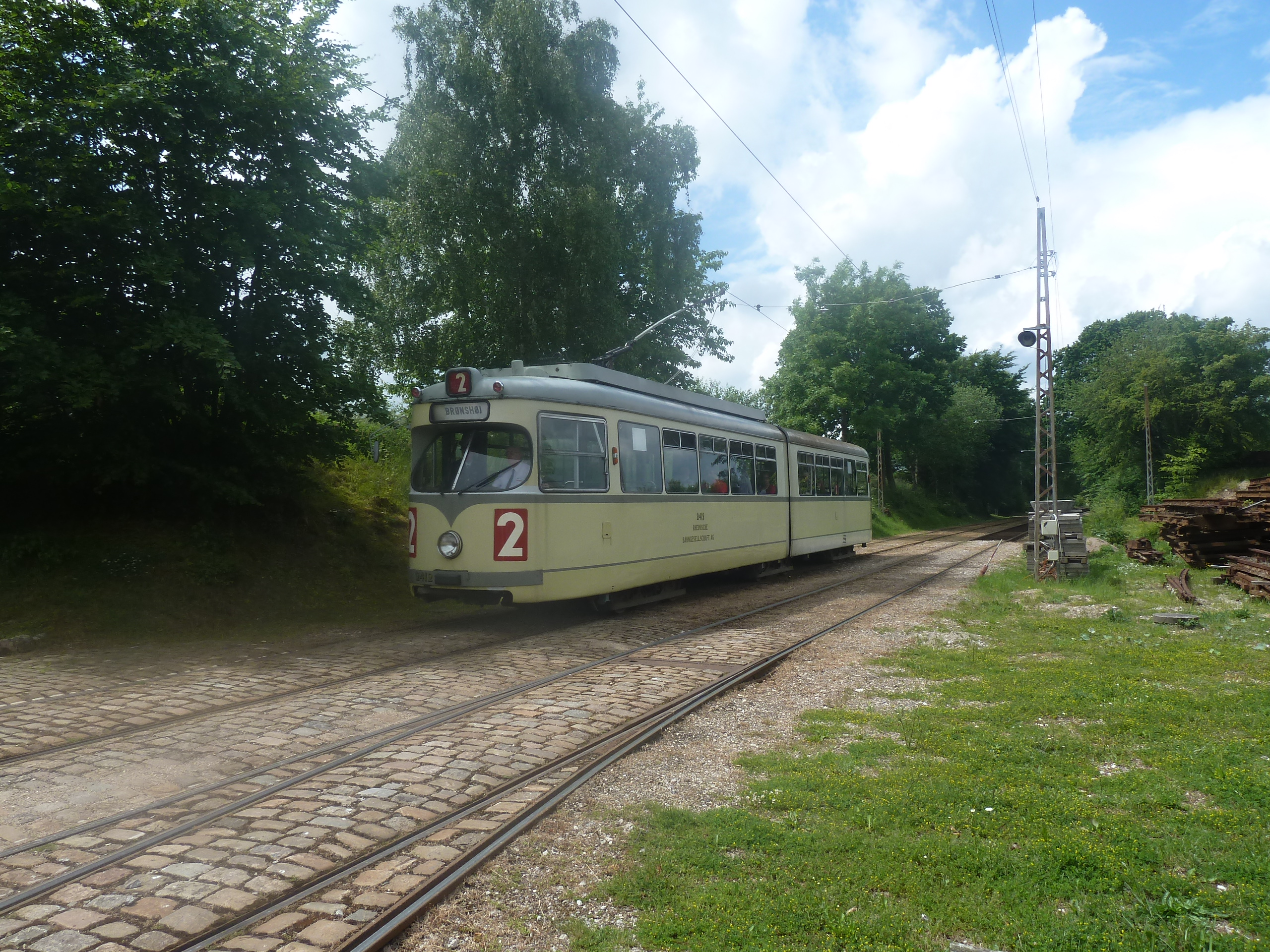 Old tram from Düsseldorf, RBG 2412, Sporvejsmuseet Skjoldenæsholm in Denmark.